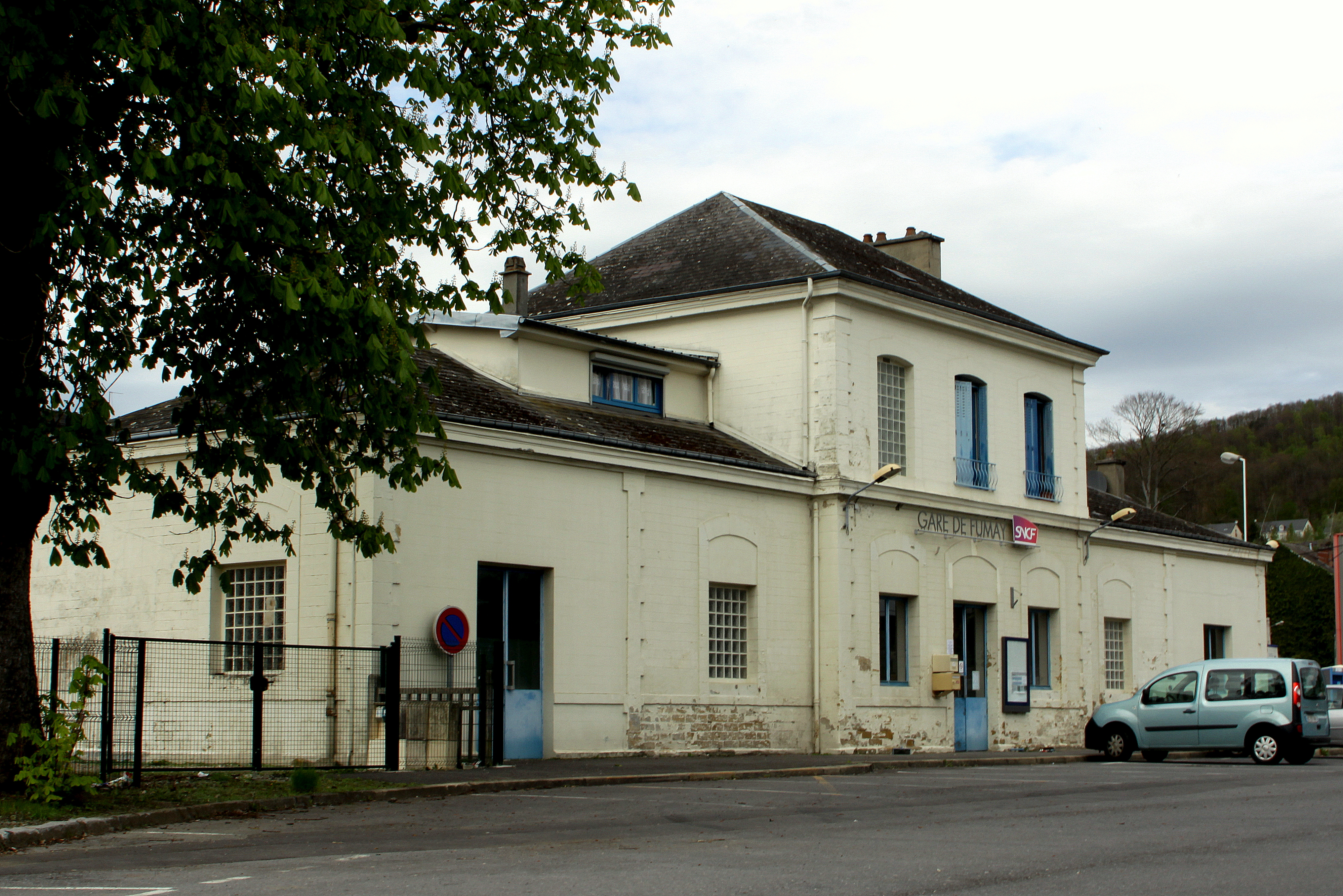 Gare vu Fumay Abrëll 2012